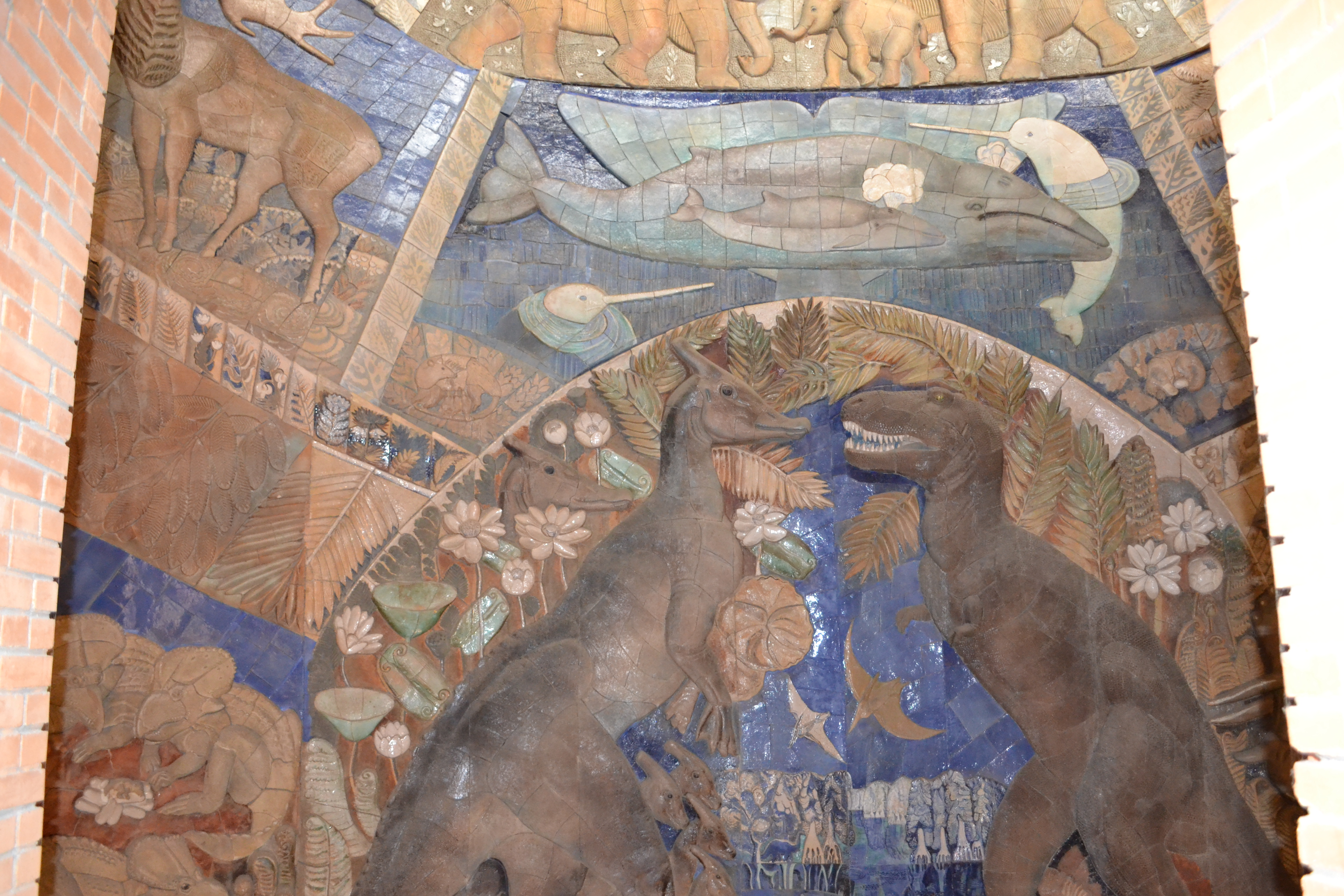 Панно в Палеонтологическом музее - 1